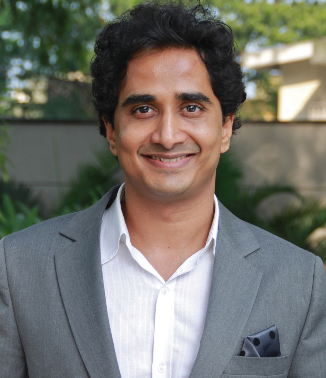 Kranti Kanade